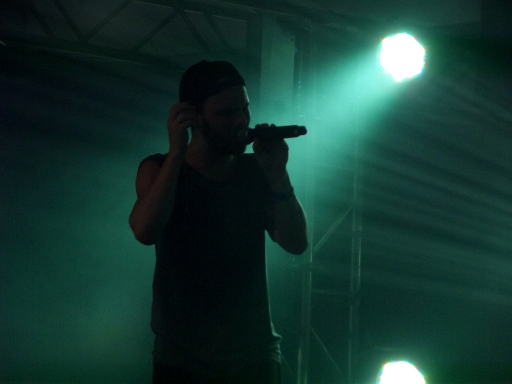 Autre Ne Veut during OFF Festival 2013.